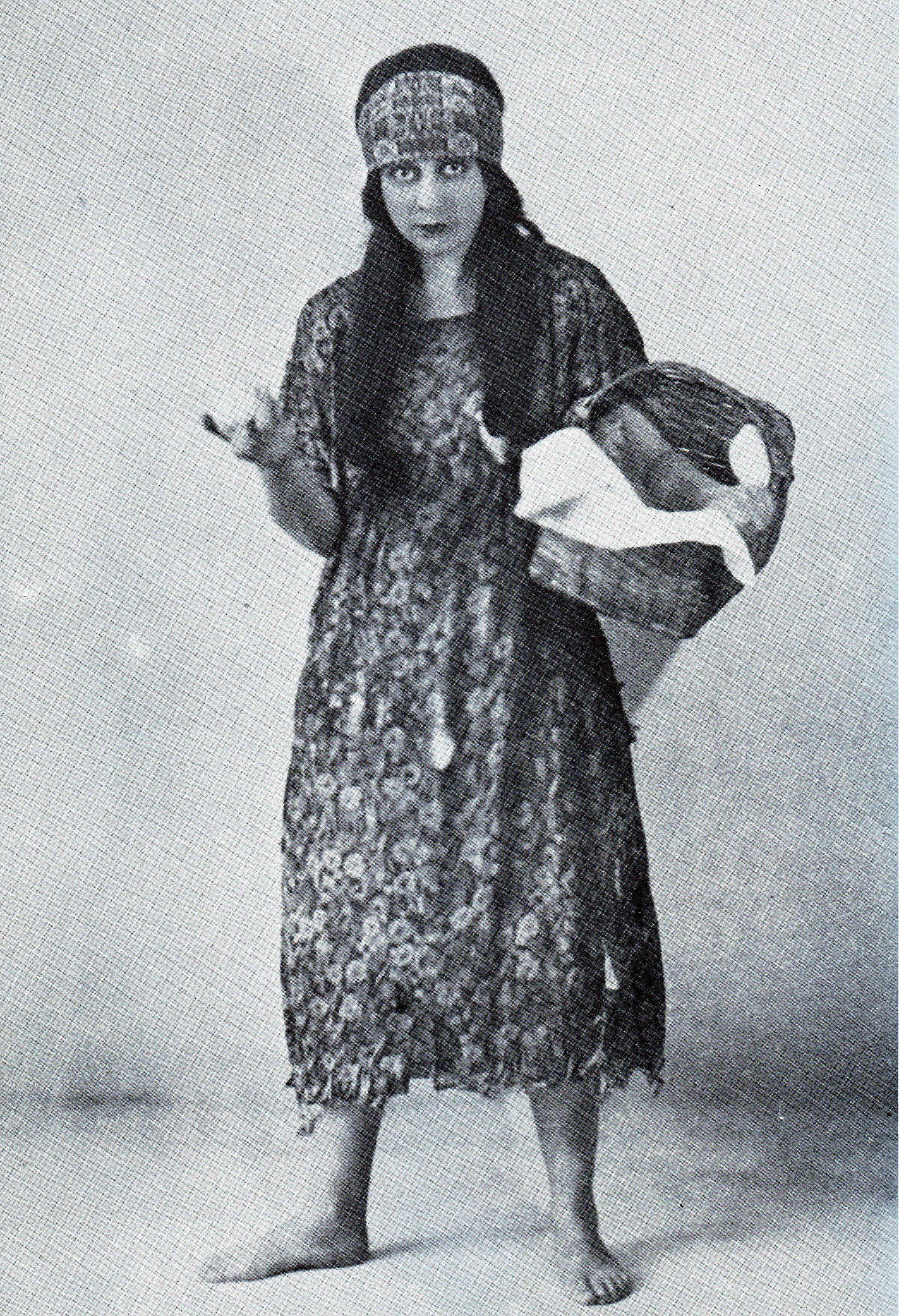 Wena Naudé in die De Groot-aanbieding van Oorskotjie in 1926.